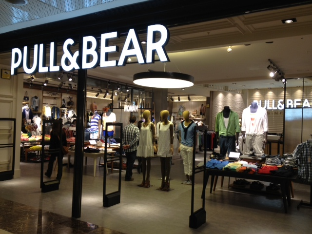 store of pull and bear, INDITEX